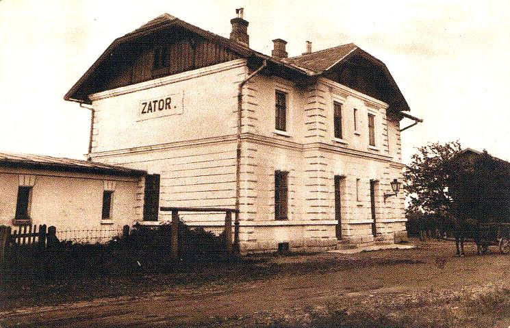 Железнодорожный вокзал в Заторе (Польша)